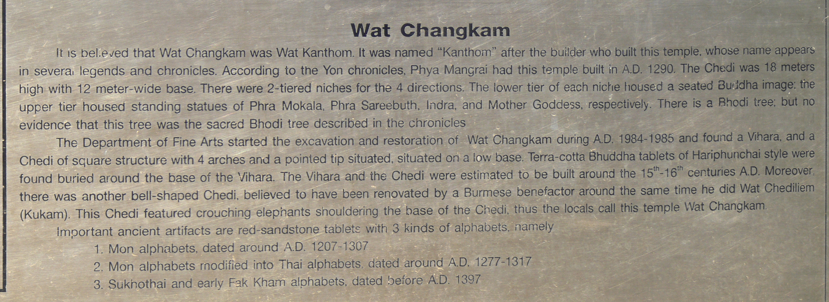 Info over de tempel die ter plekke beschikbaar is. 2-talig: Thais en Engels. Dit is de complete Engelse tekst.